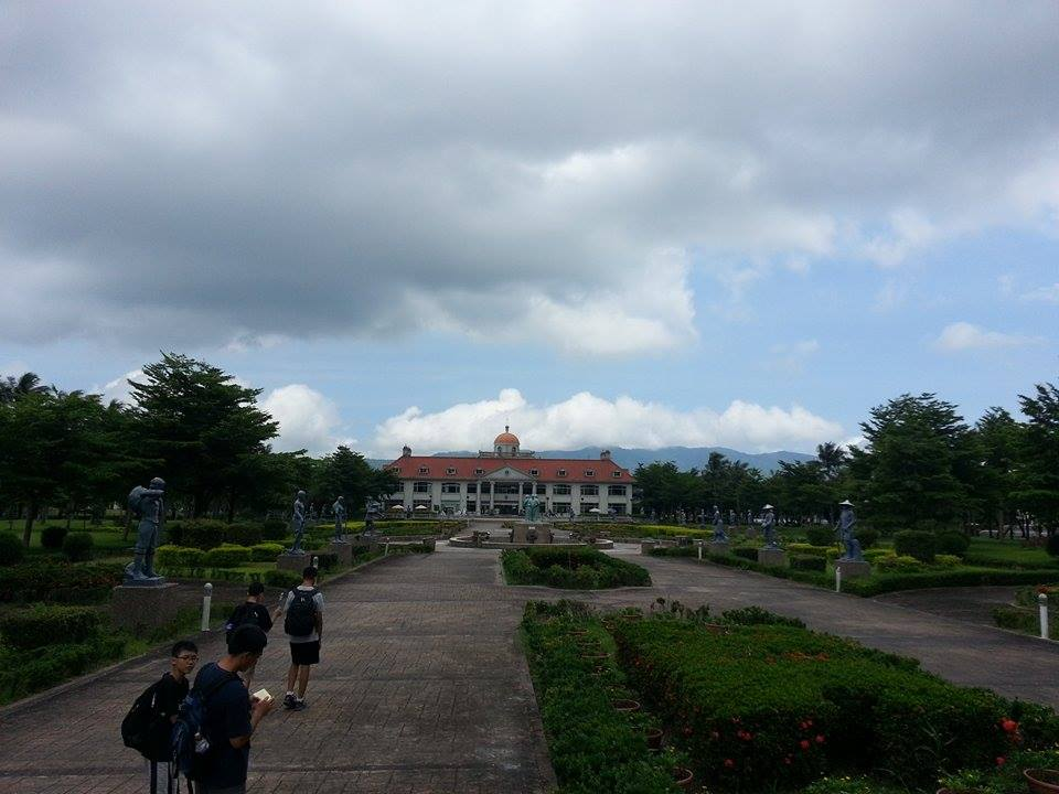 新光兆豐農場裡面